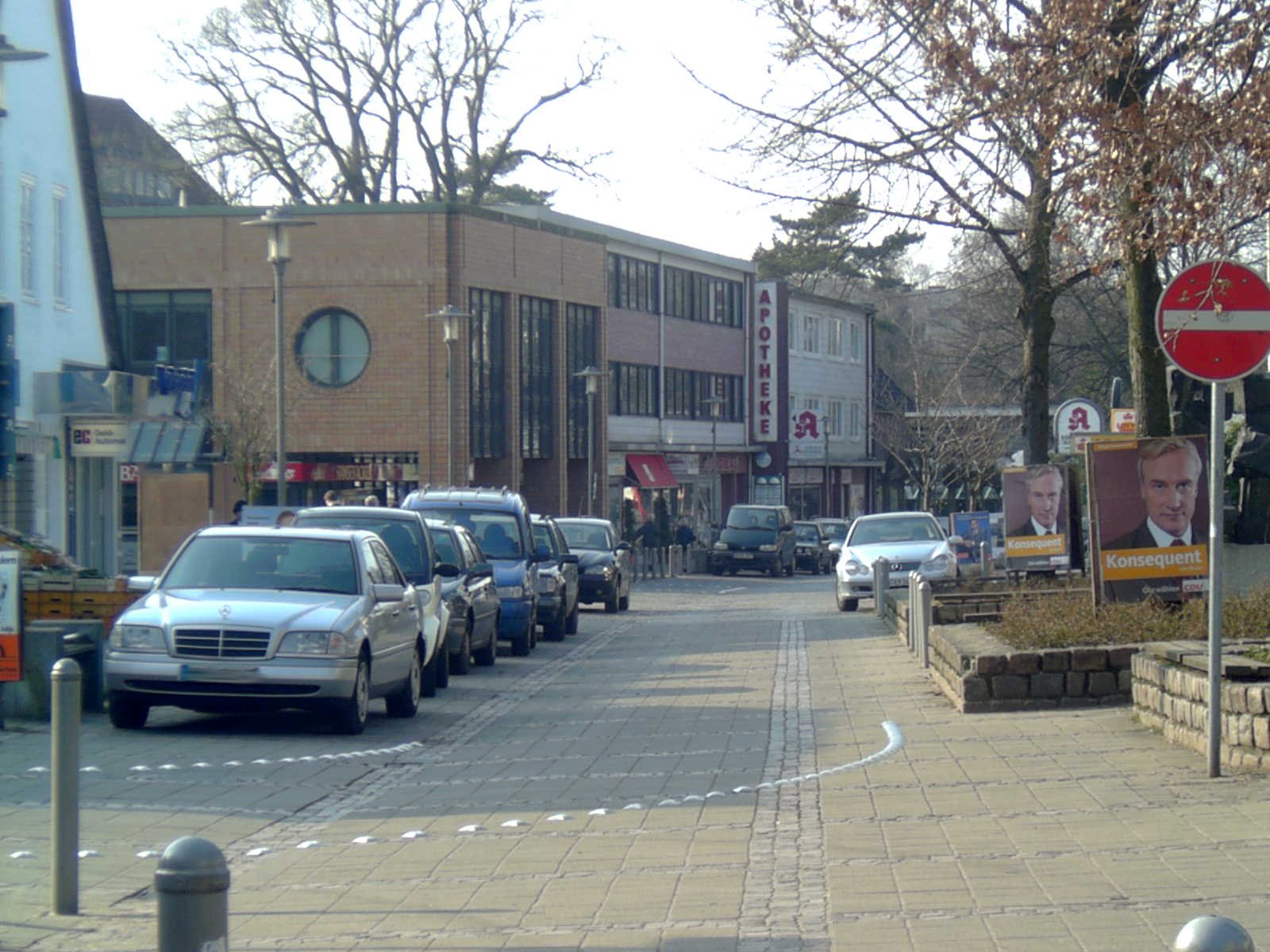 Wedeler Landstraße in Hamburg-Rissen